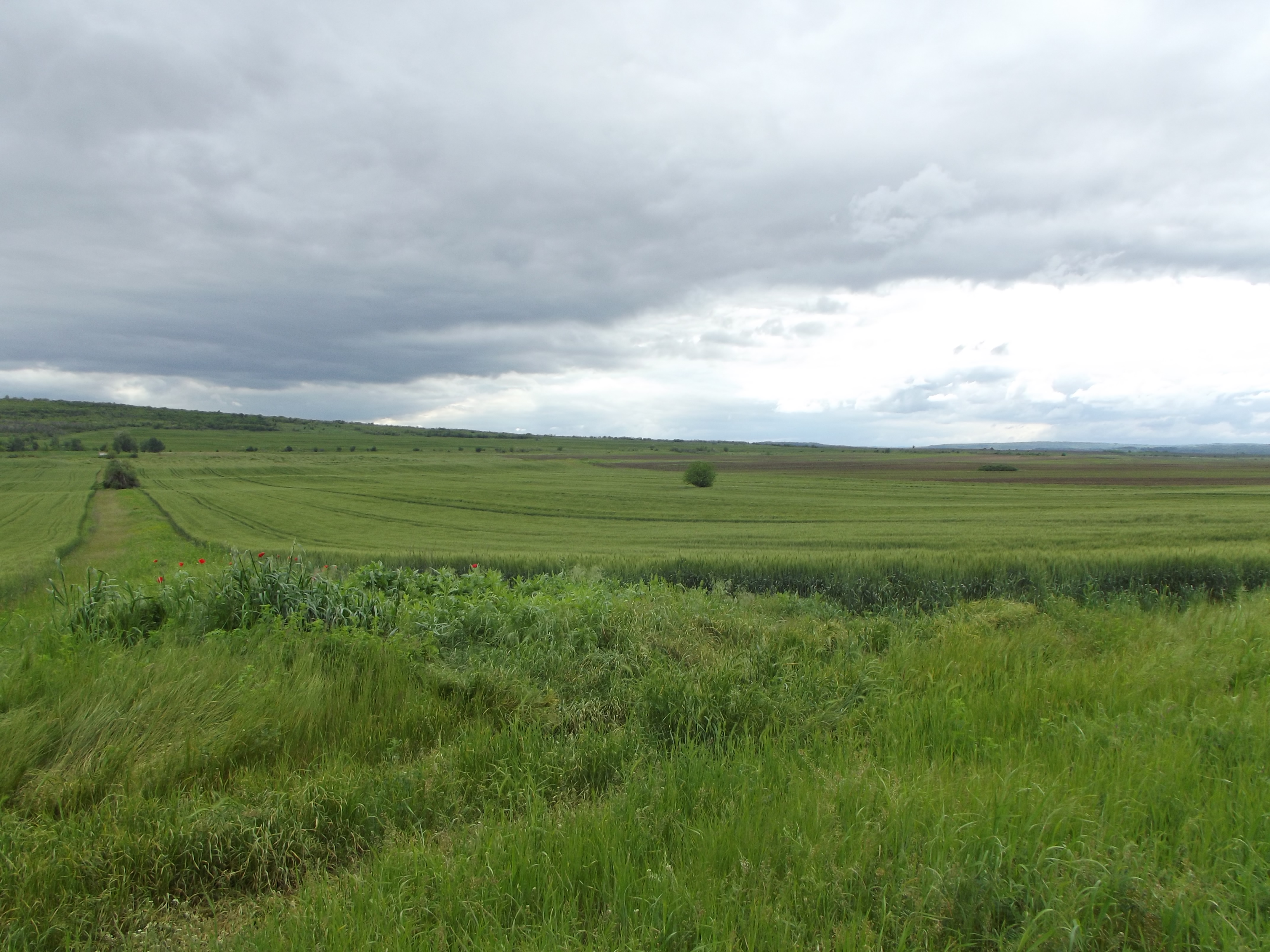 Местността "Кладенец Питаров", Ново село, област Видин